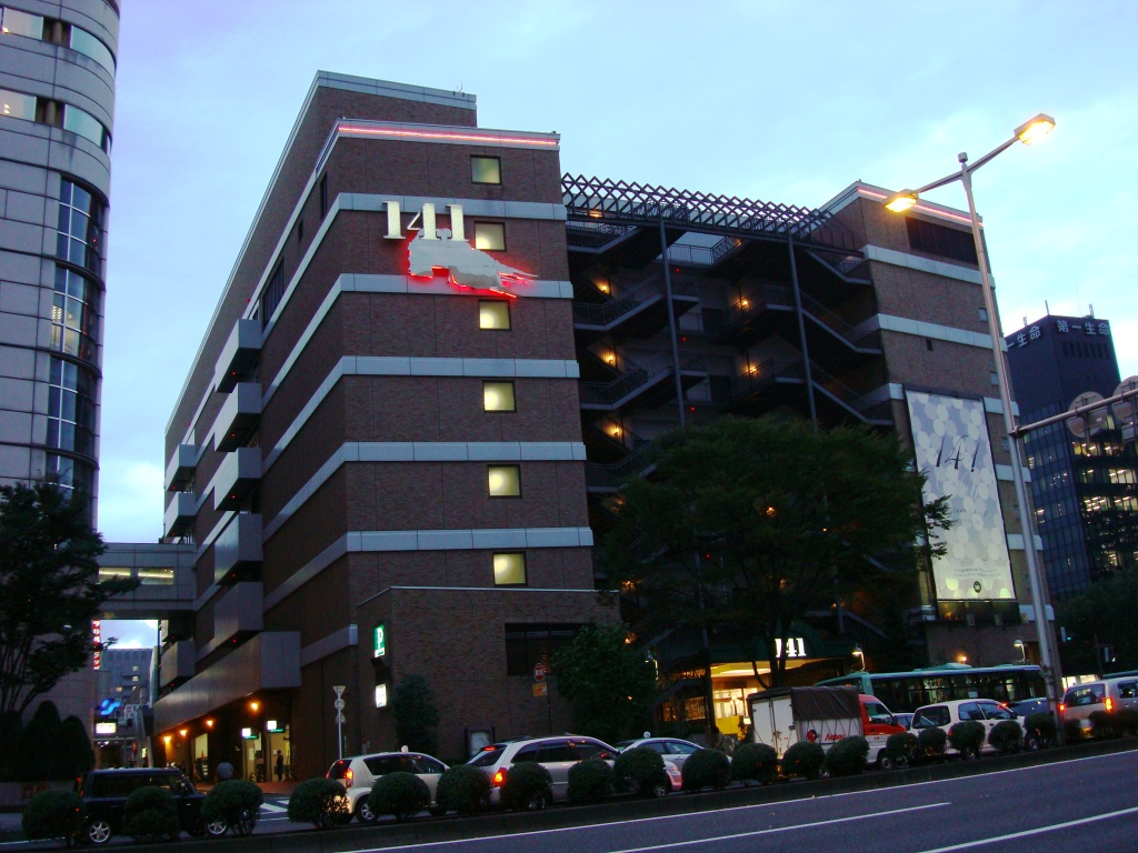 141(Ichi-Yon-Ichi) Building, Sendai City, Japan